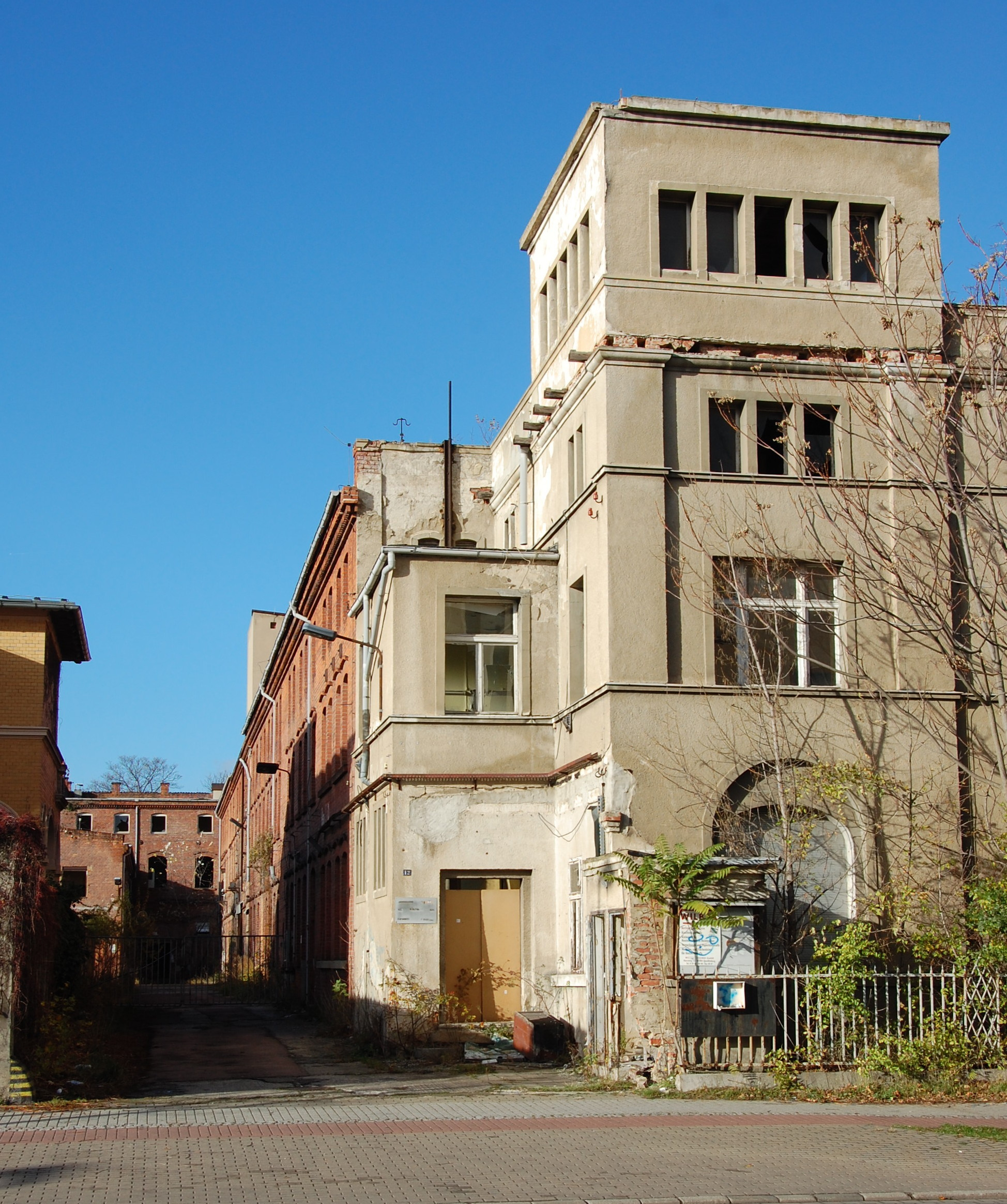 Haus Harzweg 12 in Quedlinburg